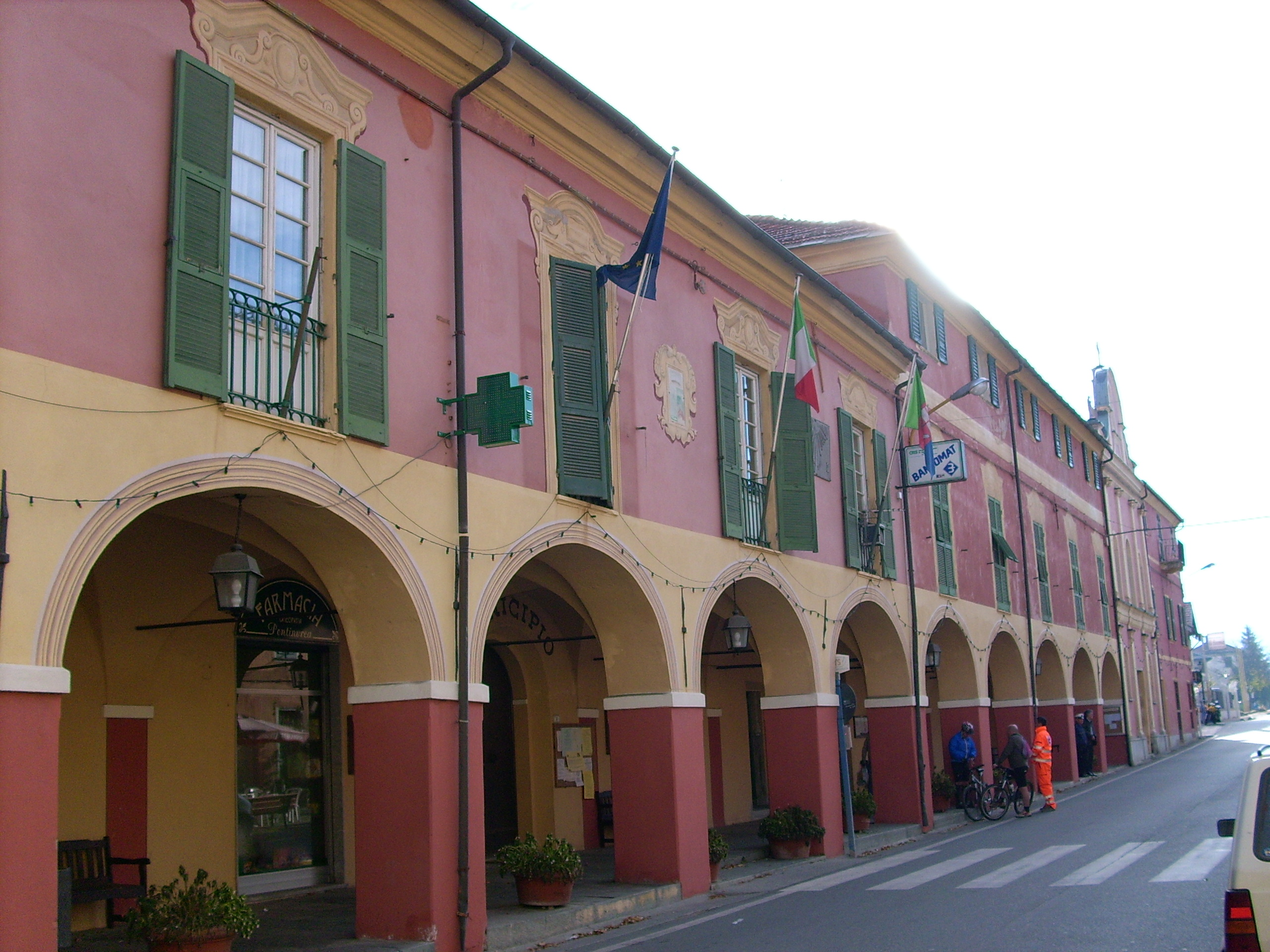 Municipio di Pontinvrea, Liguria, Italia